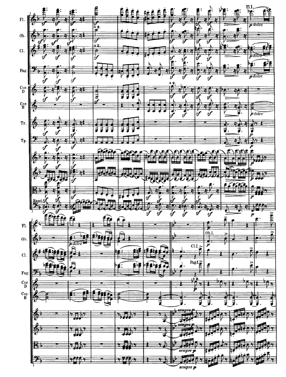 Партитура